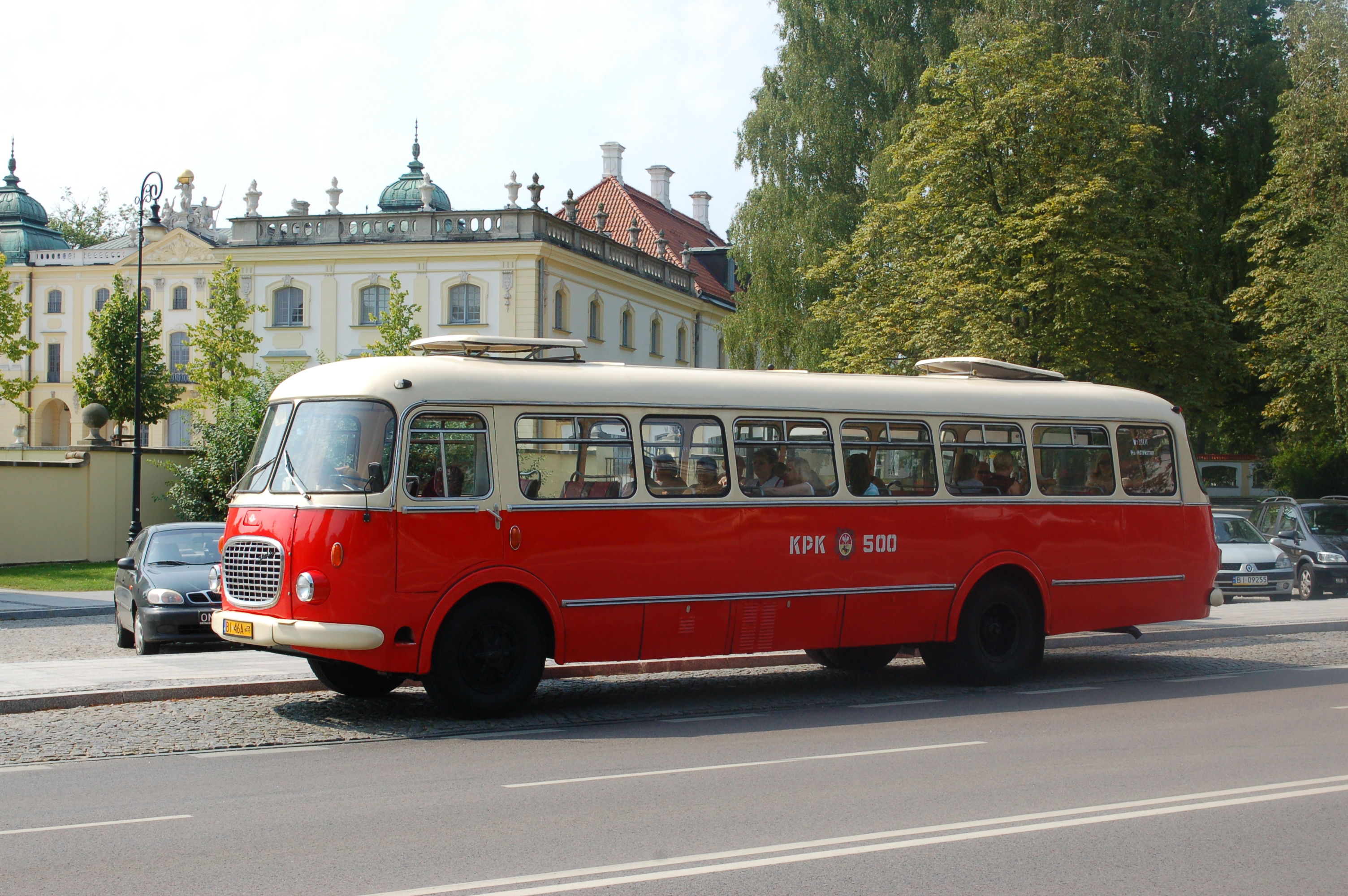 Bialystok, historischer Bus